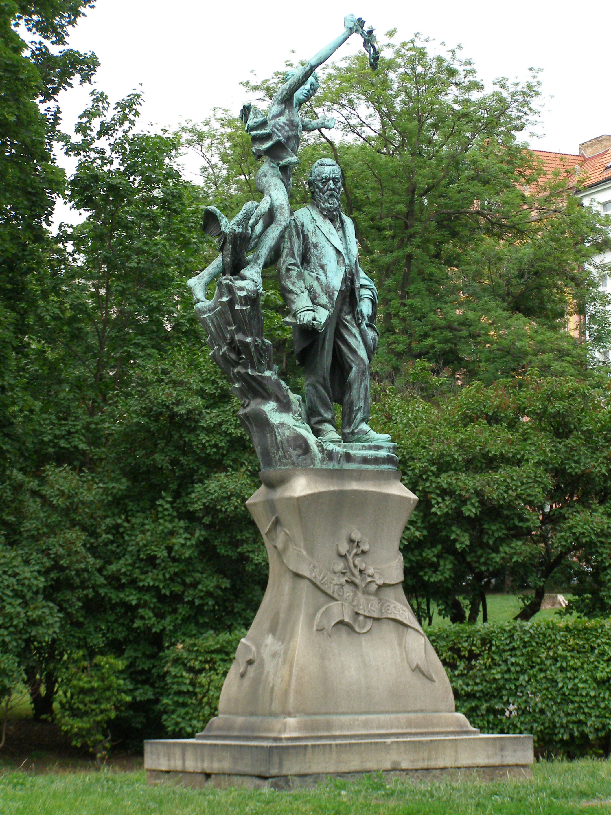 Pomník Svatopluka Čecha, Praha 2-Vinohrady, sady Svatopluka Čecha